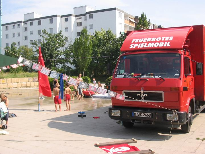 Feuerrotes Spielmobil des Bezirks Berlin-Neukölln. In den Berliner Sommerferien 2007 auf dem Grünstreifen über dem Autobahntunnel neben dem Emmauskirchhof.